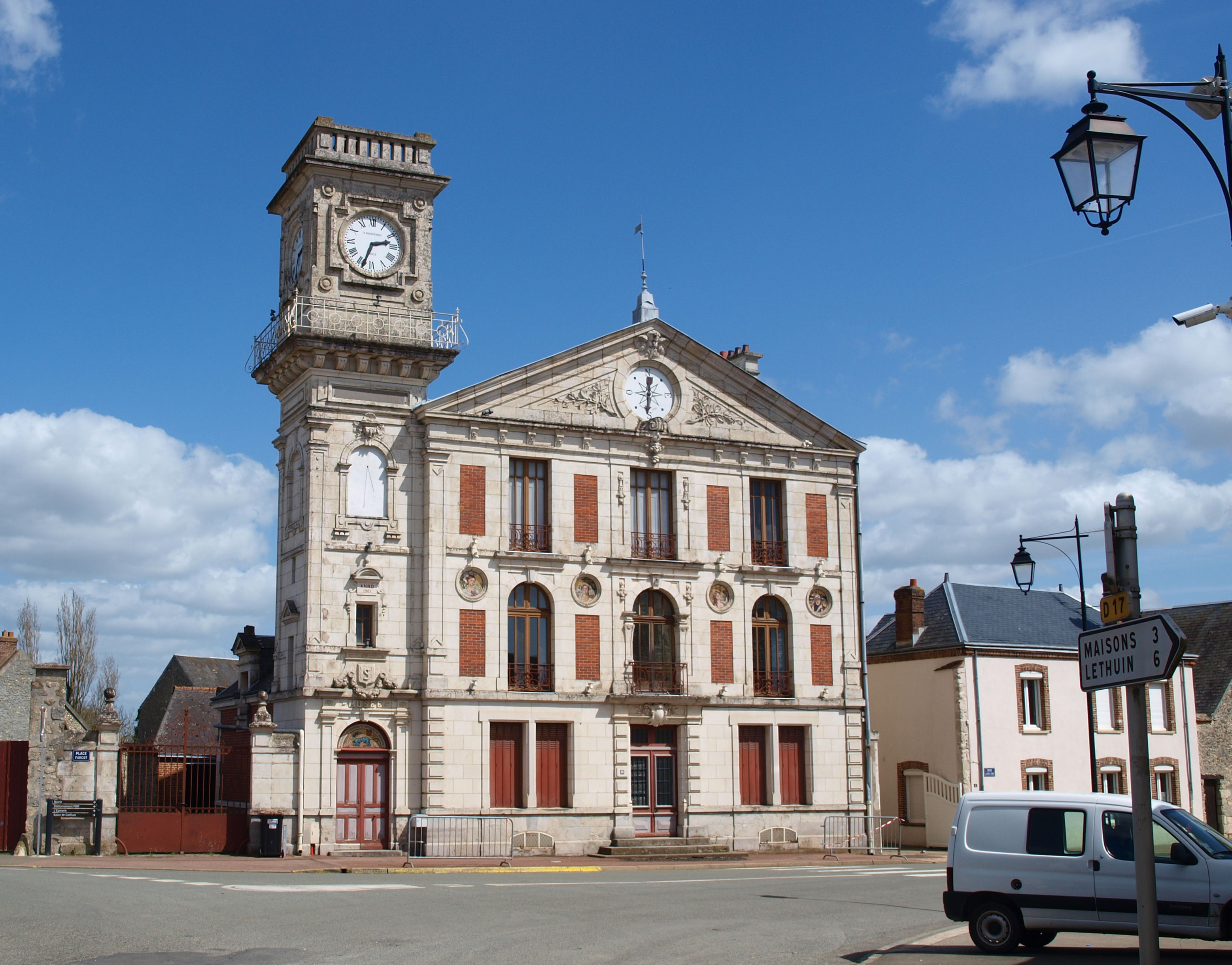 Sainville (Eure-et-Loir, France) ; le musée.